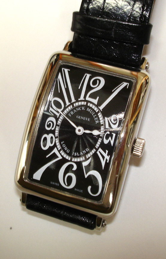 self made